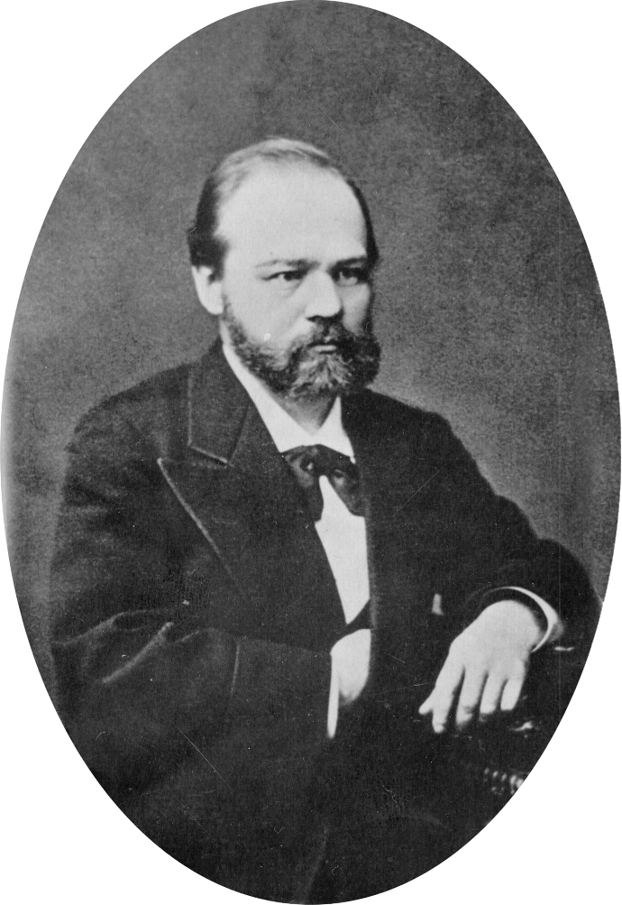 фото известного русского физика Дмитрия Александровича Лачинова